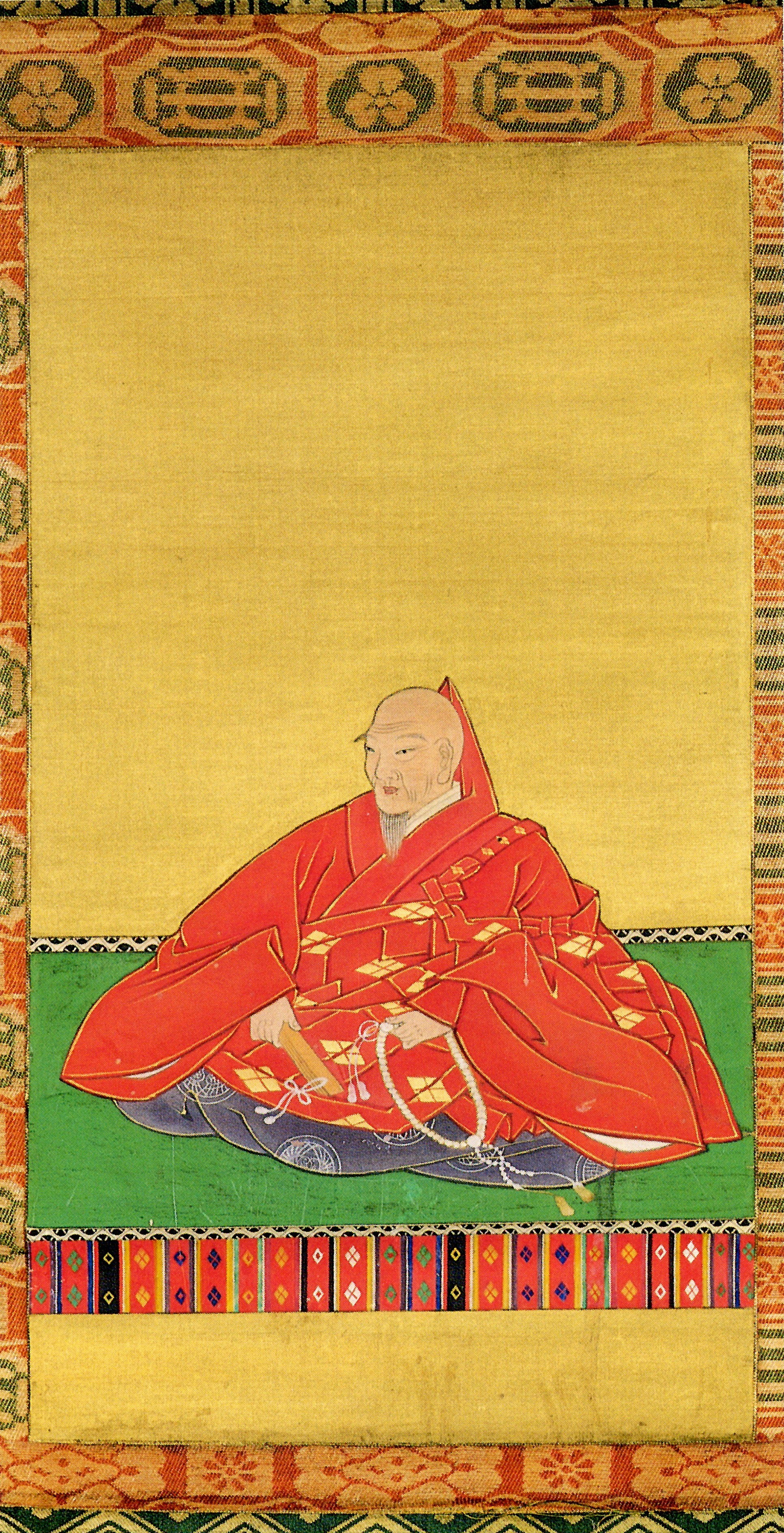 南部利謹の肖像。